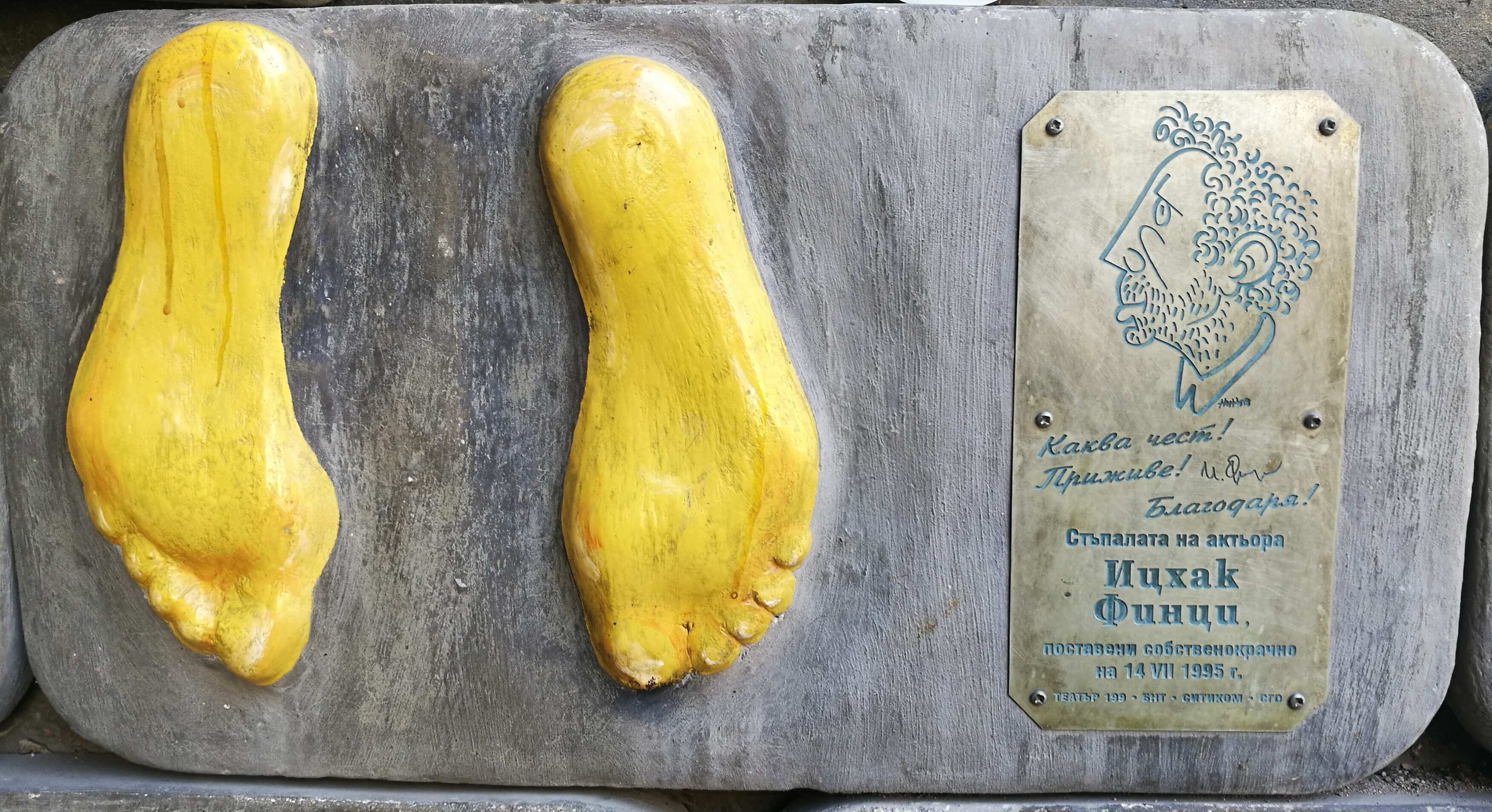 Стената на славата пред Театър 199 - пано с отпечатъци, послание и шарж на Ицхак Финци.